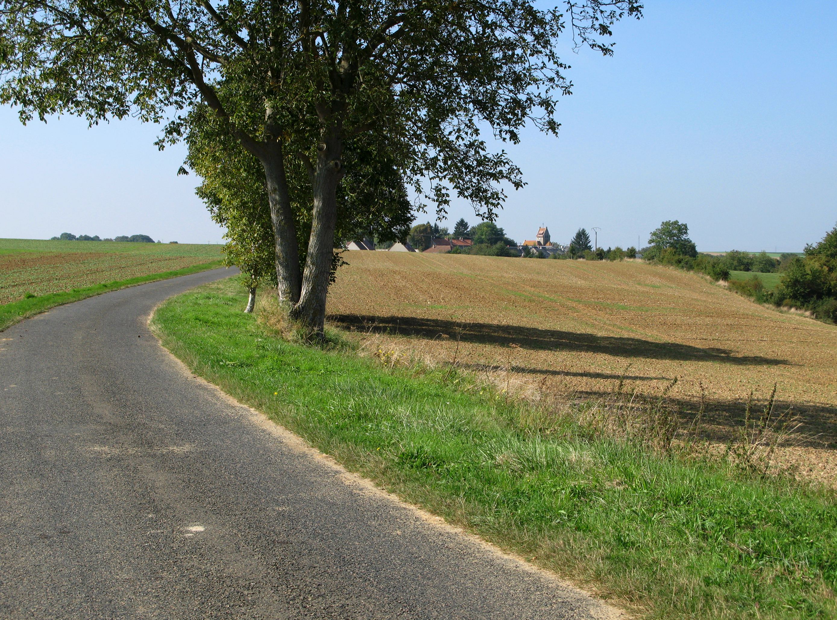 Villemontoire (Aisne, France) - Panorama sur le village. . .